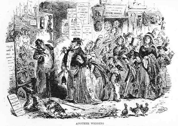 Dombey and Son, le mariage de Florence et de Walter (chapitre 60)